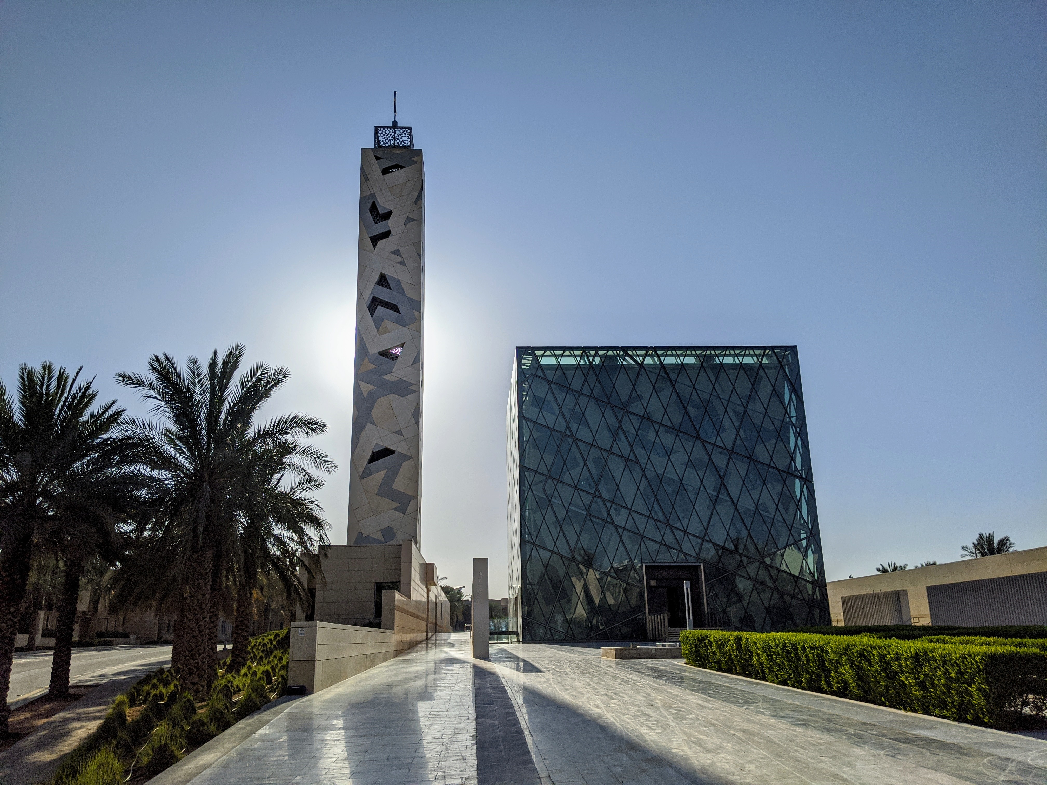 KAPSARC mosrue